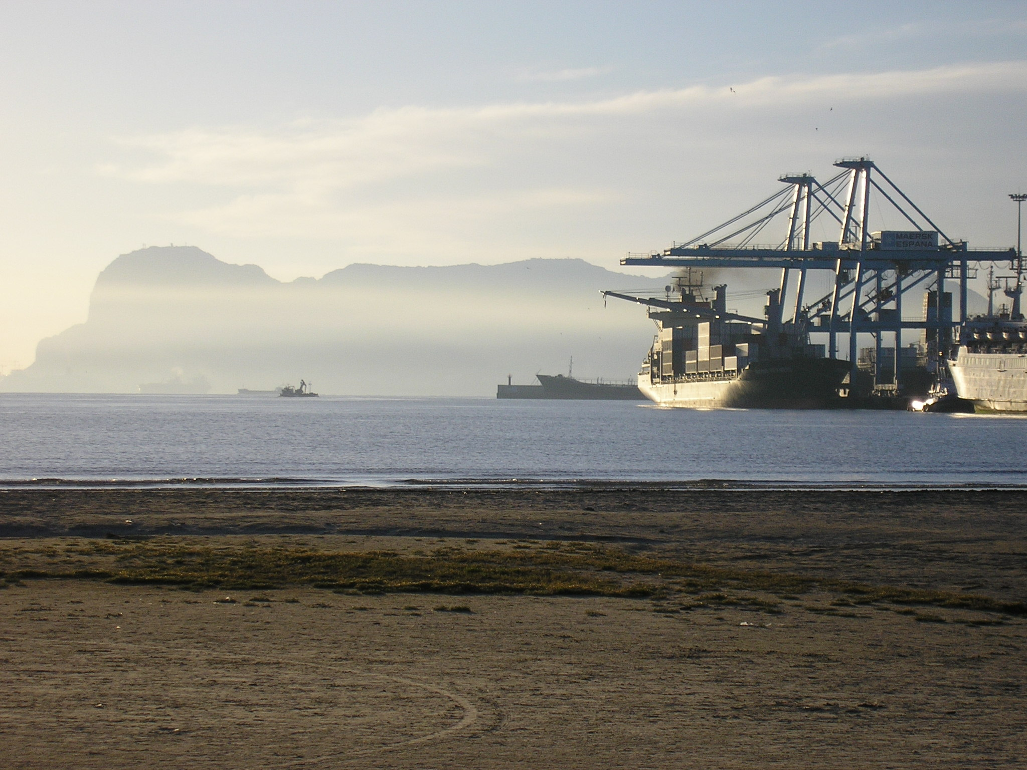 Algeciras, Playa del Rinconcillo, Gibraltar al fondo Fotografia realizada el 12 de abril de 2006 por Carlos Diaz